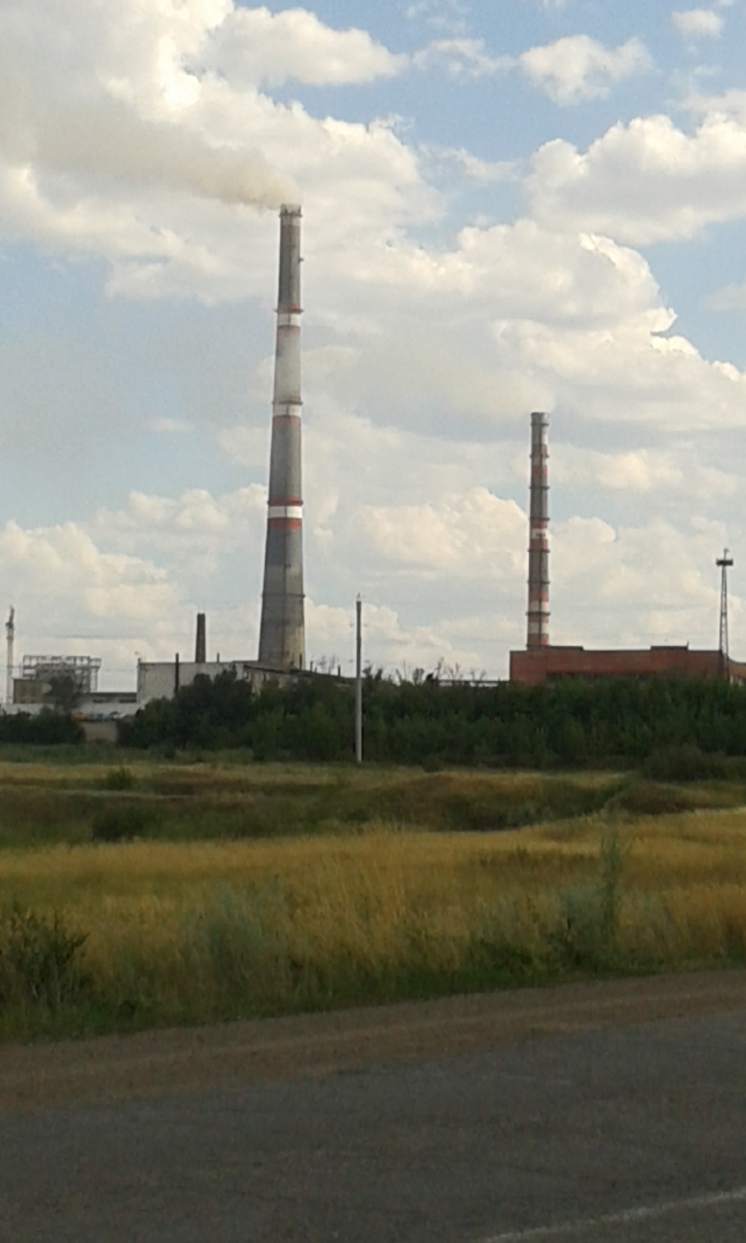 Карагандинская ТЭЦ-3